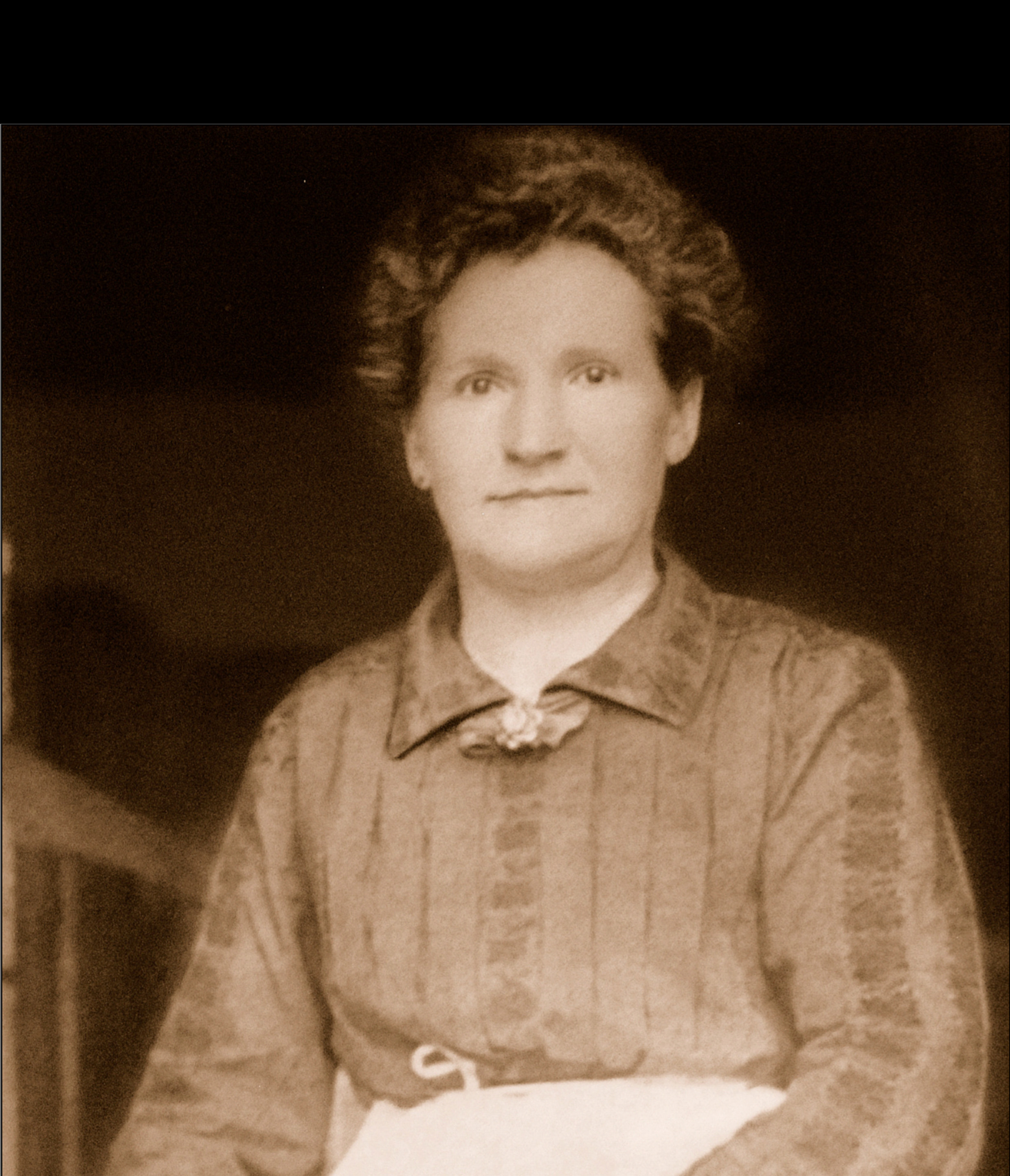 Portrait de la mère Maury